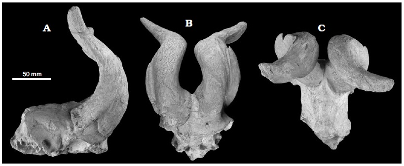 Oiocerin antelope Samotragus crassicornis Sickenberg, 1936, partial skull SMF M1965 from Samos, Greece (Turolian, Late Miocene), in lateral (A), anterior (B), and dorsal (C) views. Photo courtesy of Senckenberg Museum Frankfurt.